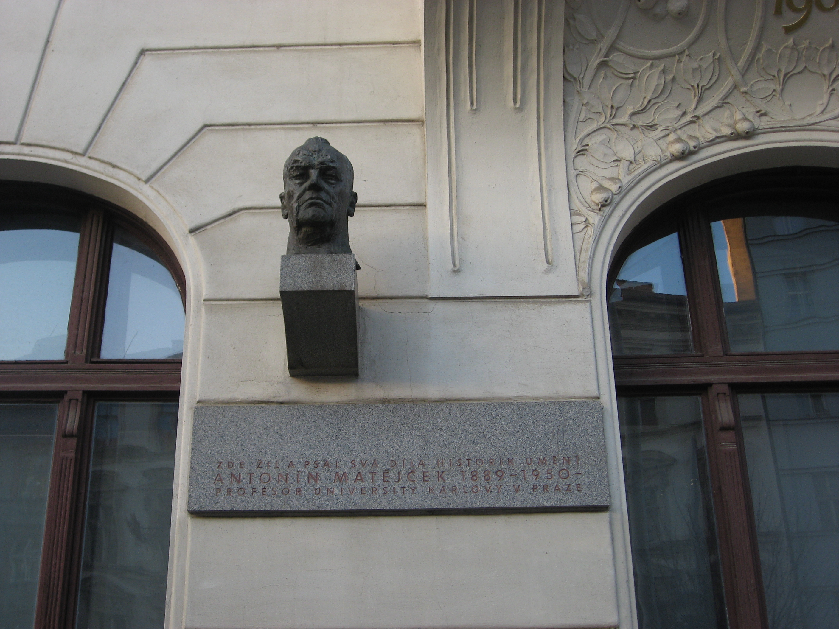 Antonín Matějček, pamětní deska, Praha-Nové Město, Senovážné náměstí 1986/12.